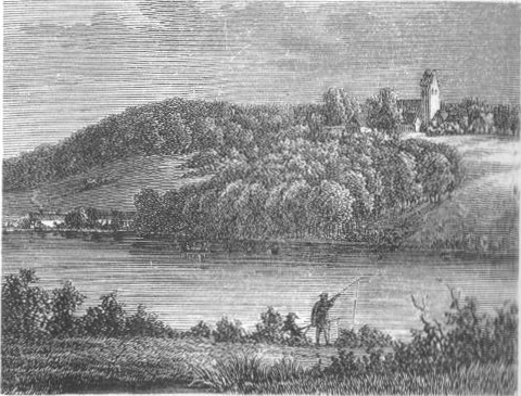 Parti fra Søllerød, det fra Øverød.